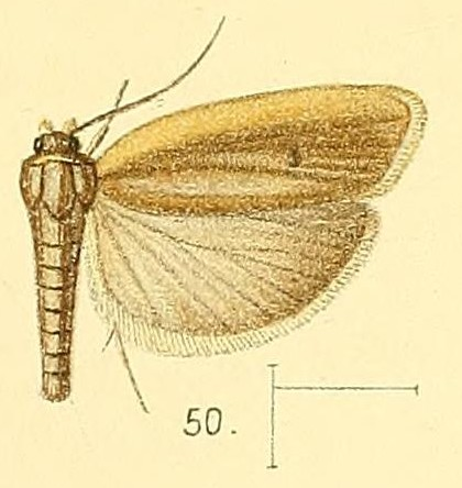 Stenoma complanella